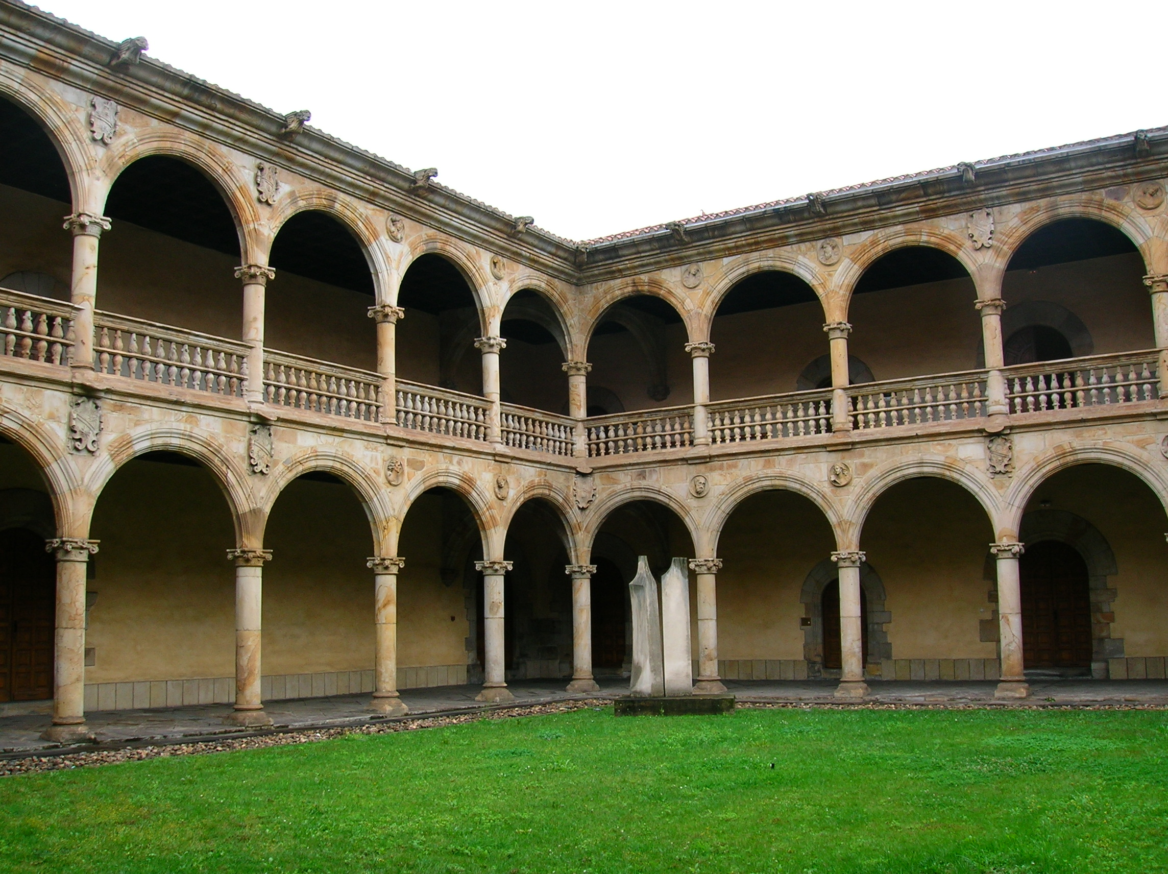 Patio plateresco de la Universidad de Oñate (Guipúzcoa).